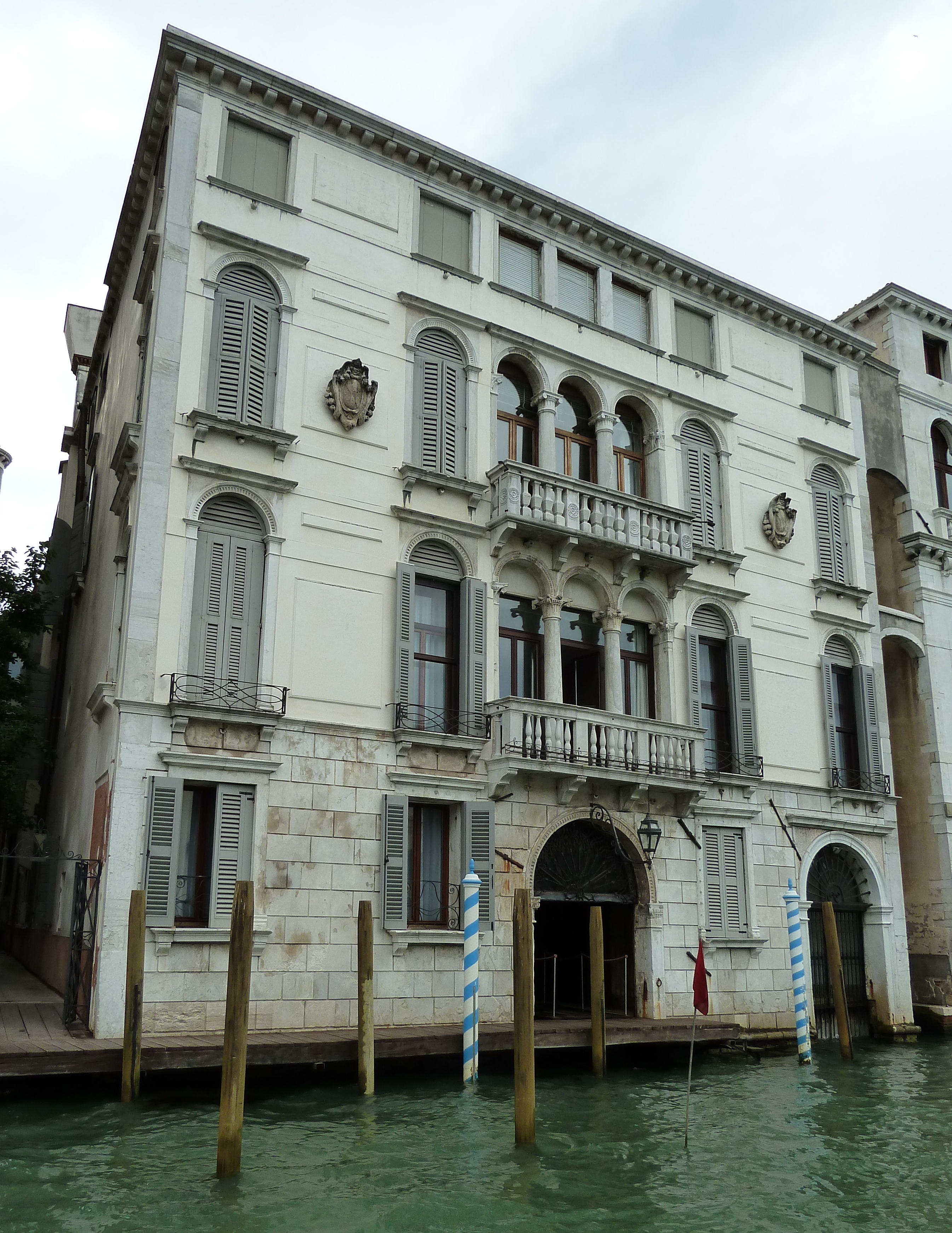 Palazzo Bernardo Nani (Venice)